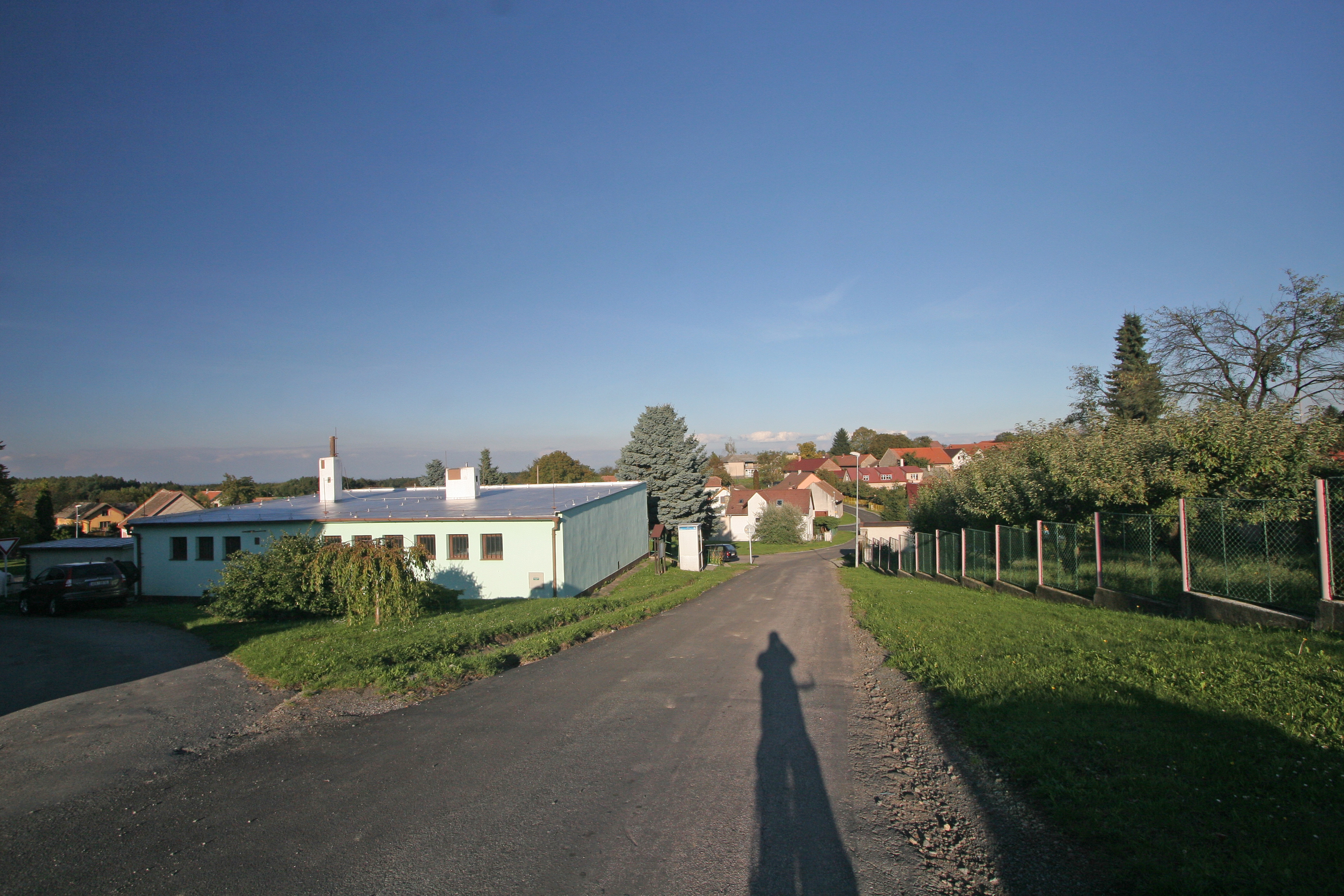 Turkovice čp. 67